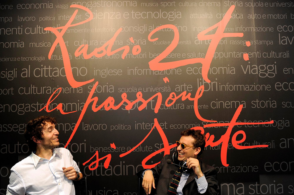 La Zanzara